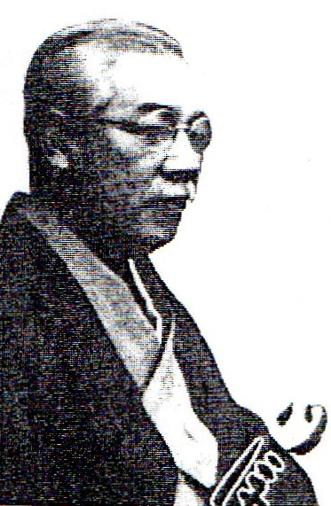 日本基督教会牧師の川添万寿得